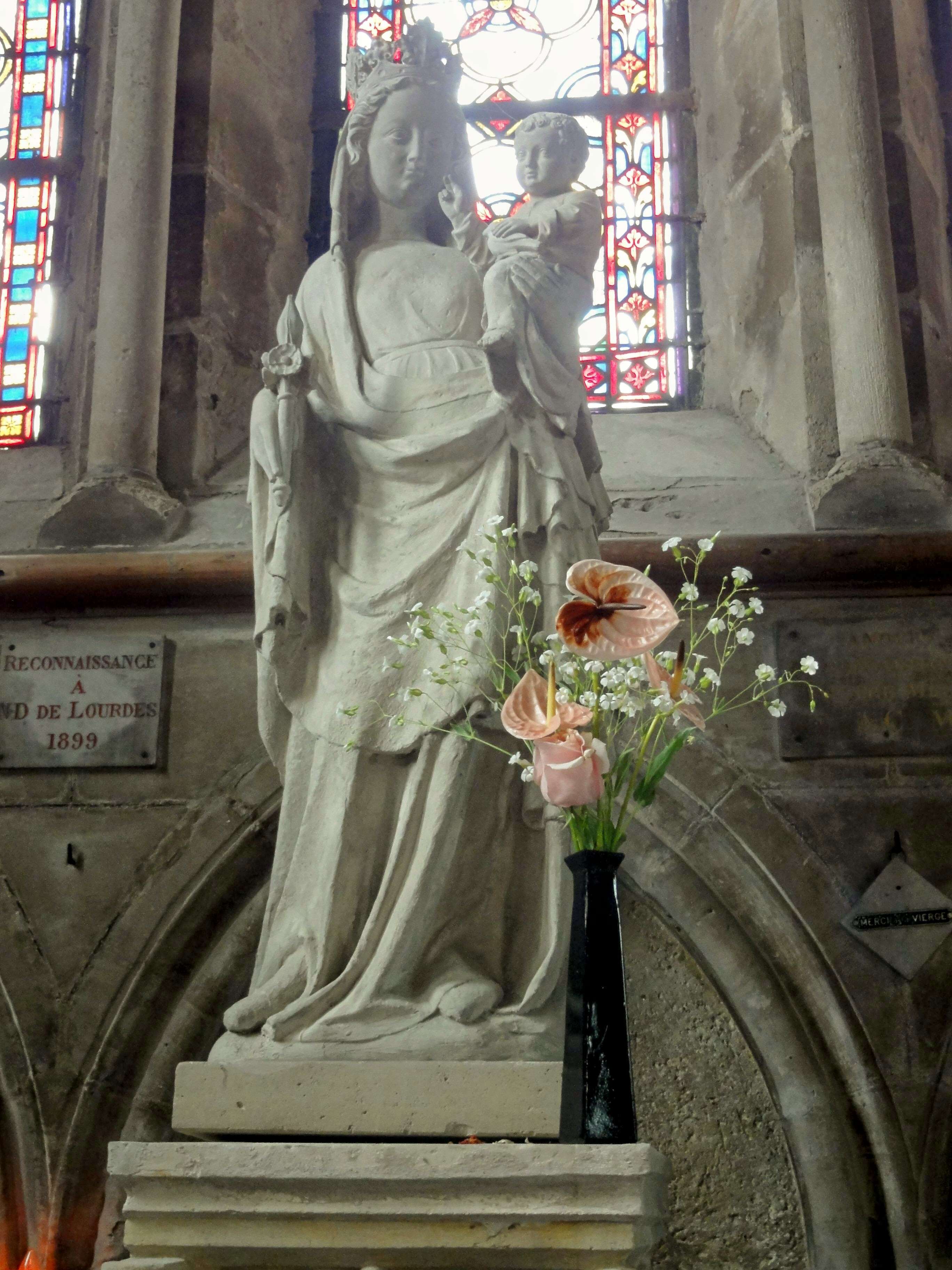 Vierge à l'Enfant du XIIIe siècle, devant le chevet du collatéral nord (chapelle de la Vierge).